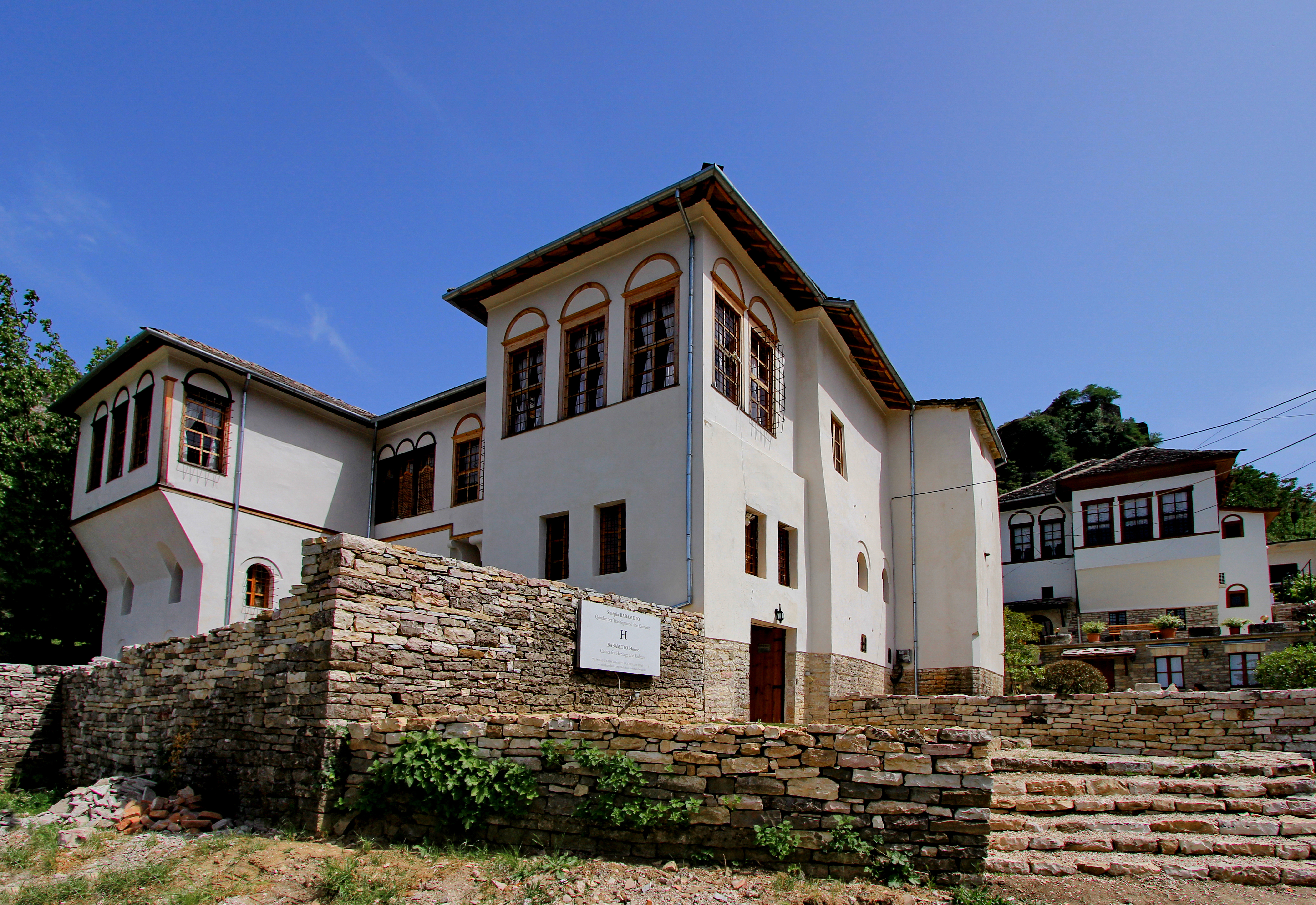 Banesa e Iljaz Babametos